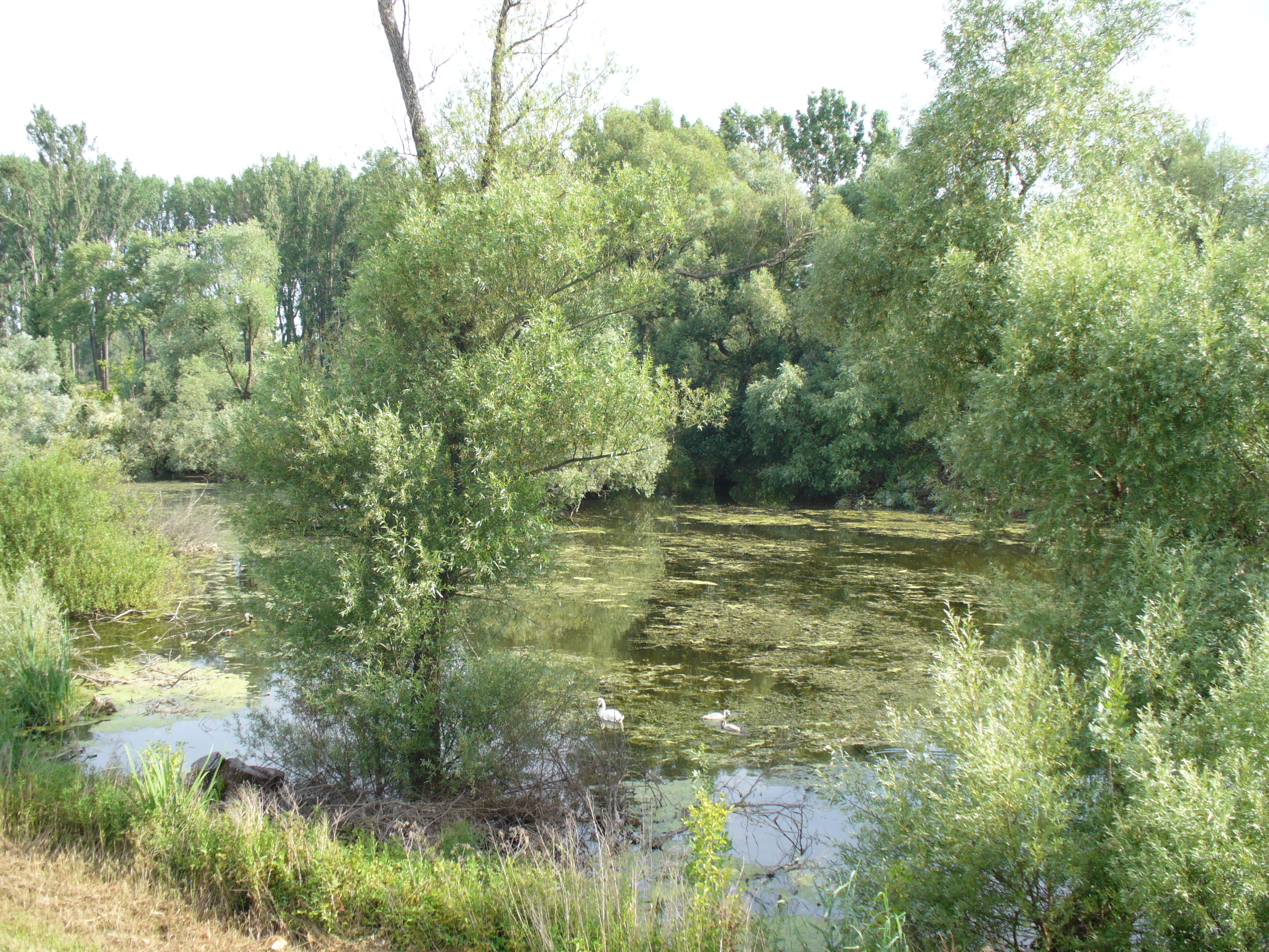 Dunajské luhy floodplains near Dobrohošť and Vojka nad Dunajom, Trnava Region, Slovakia